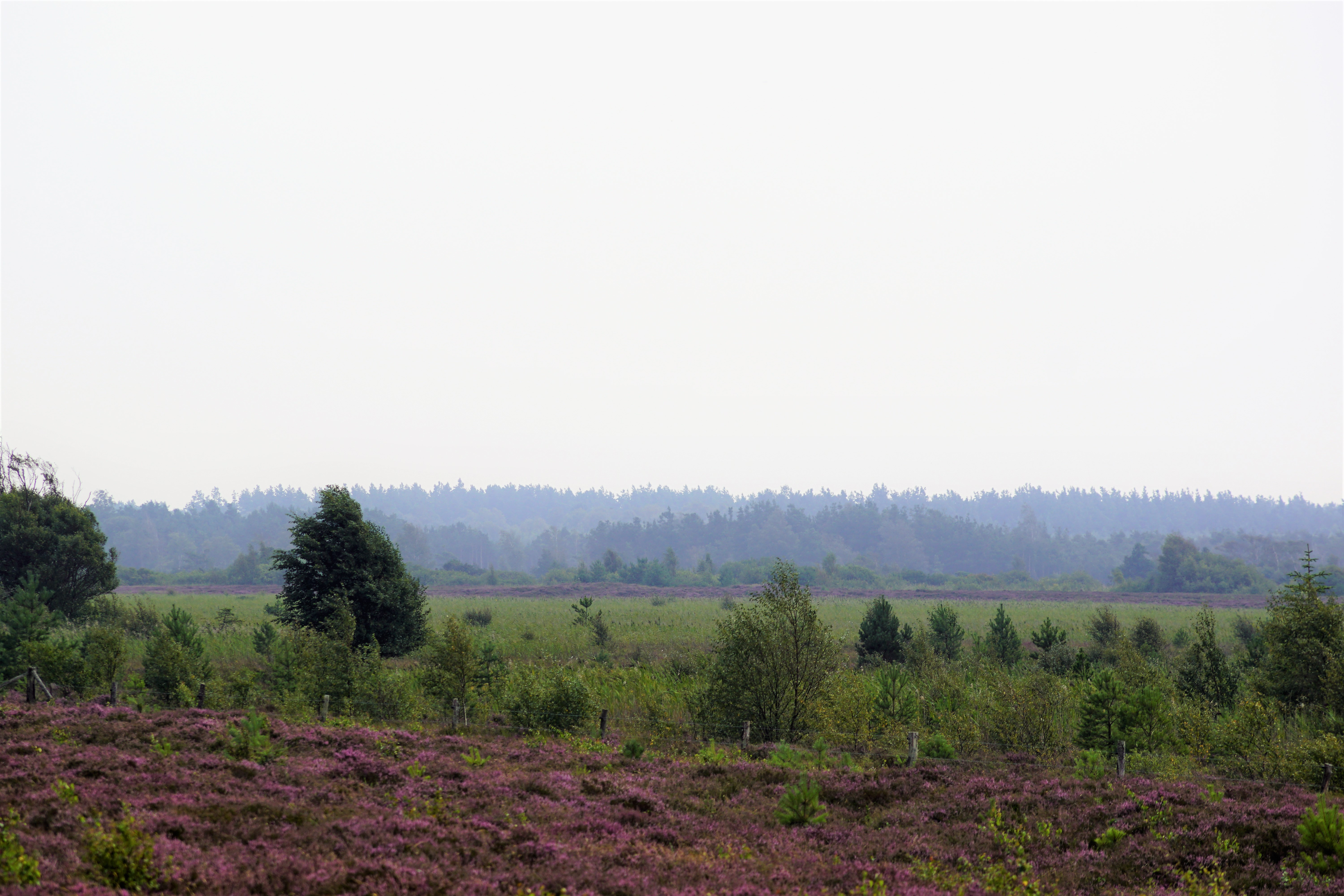 Naturområdet Kærene på Læsø set fra nord